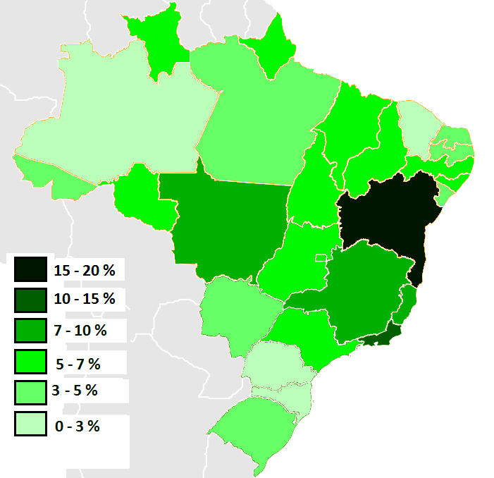 Percentagem de pretos no Brasil no ano de 2009. Fontes